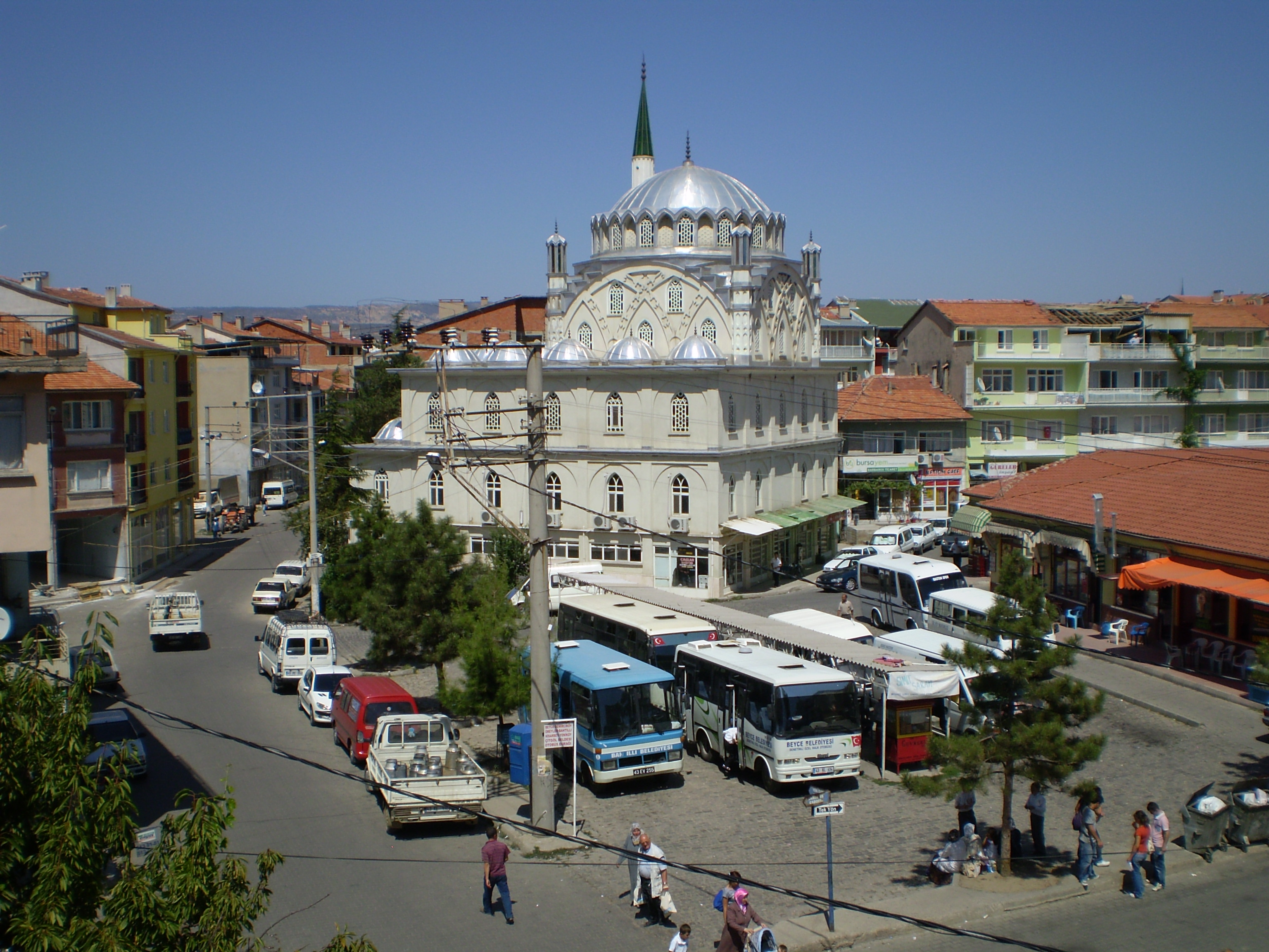 Yeni Cami Simav